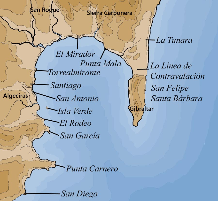 Mapa indicativo de los fuertes del siglo XVIII de la Bahía de Algeciras Imagen realizada para Wikimedia.